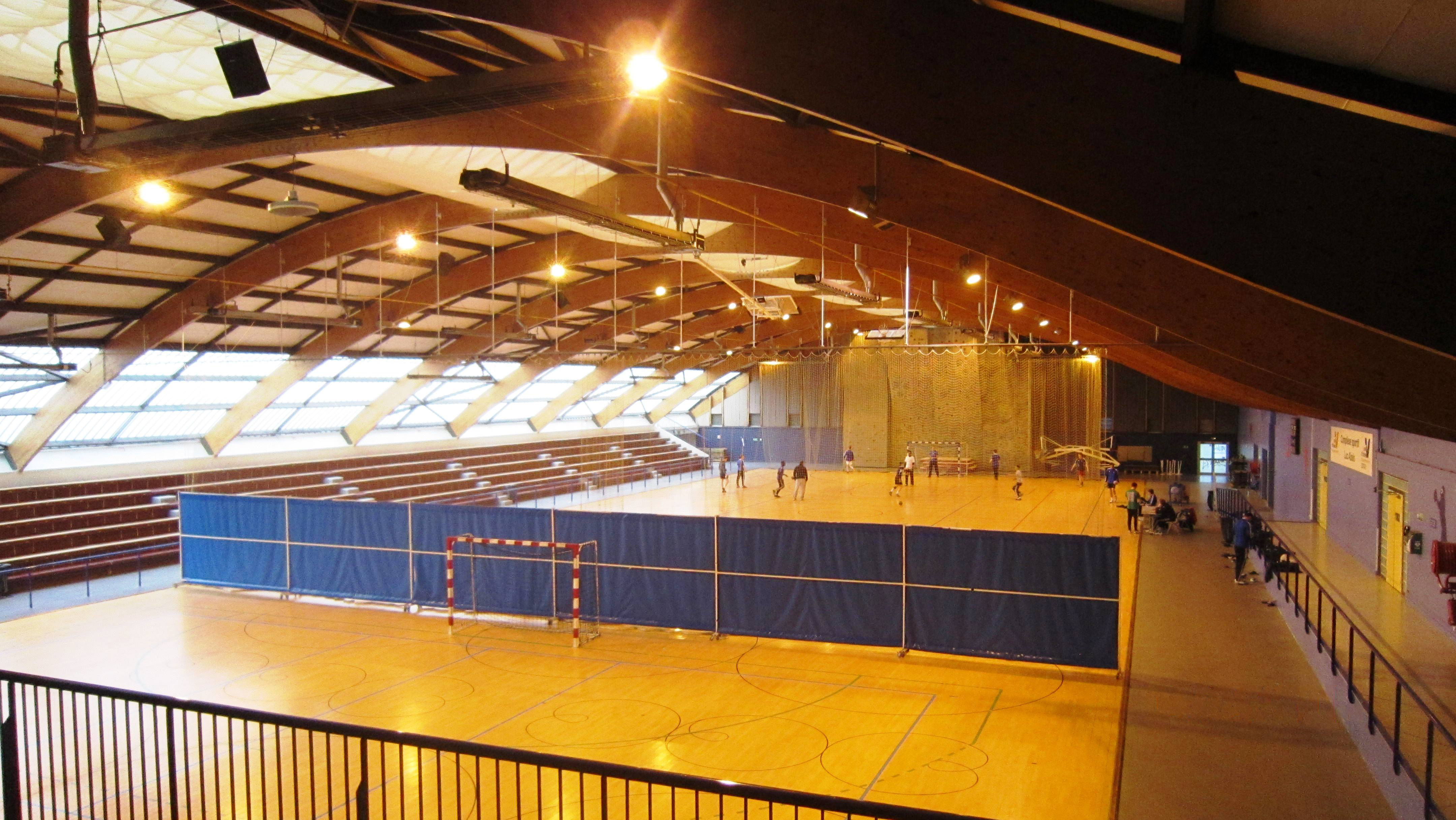 Salle Abalo du CDFAS